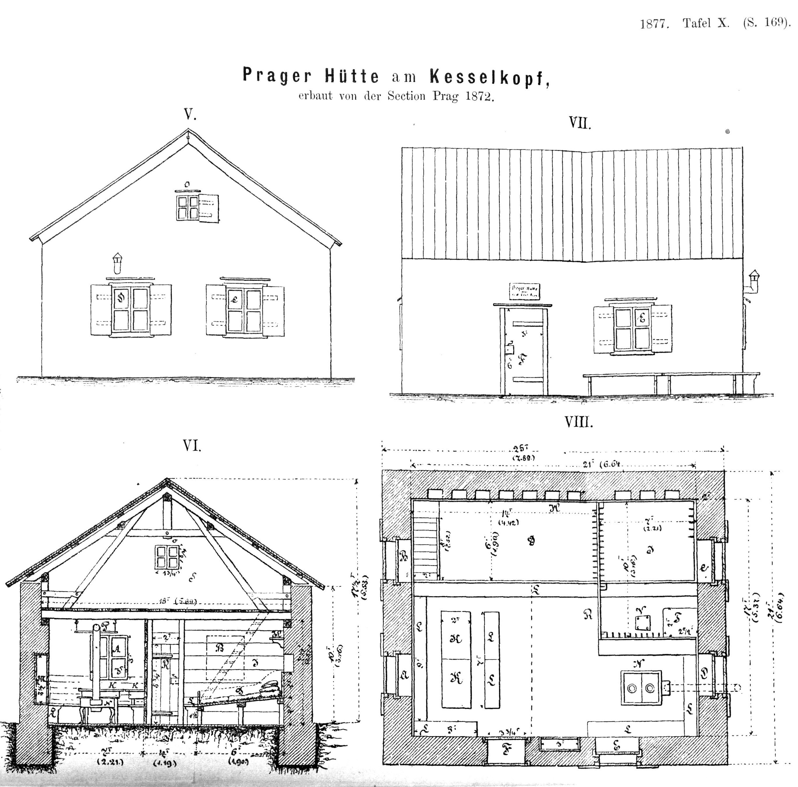 Entwurfszeichnung der Prager Hütte aus Zeitschrift des Deutschen und Österreichischen Alpenvereins Bd. 08 (1877)